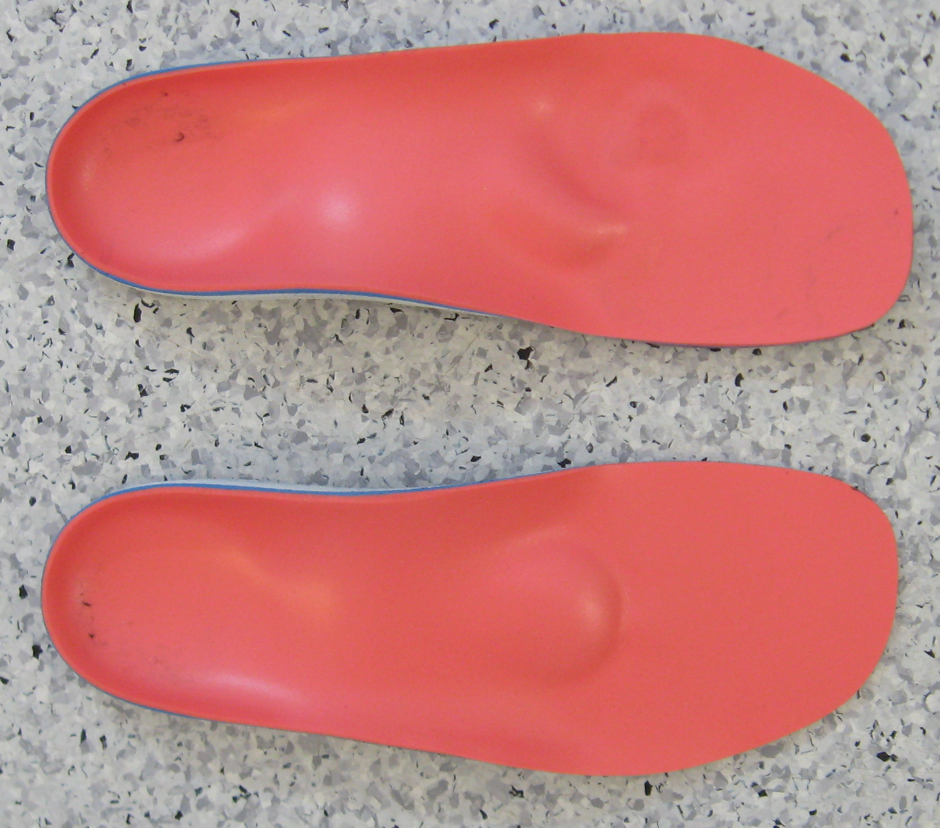 Ortopedski ulošci po otisku, avgust 2010. Autor: Mile MD